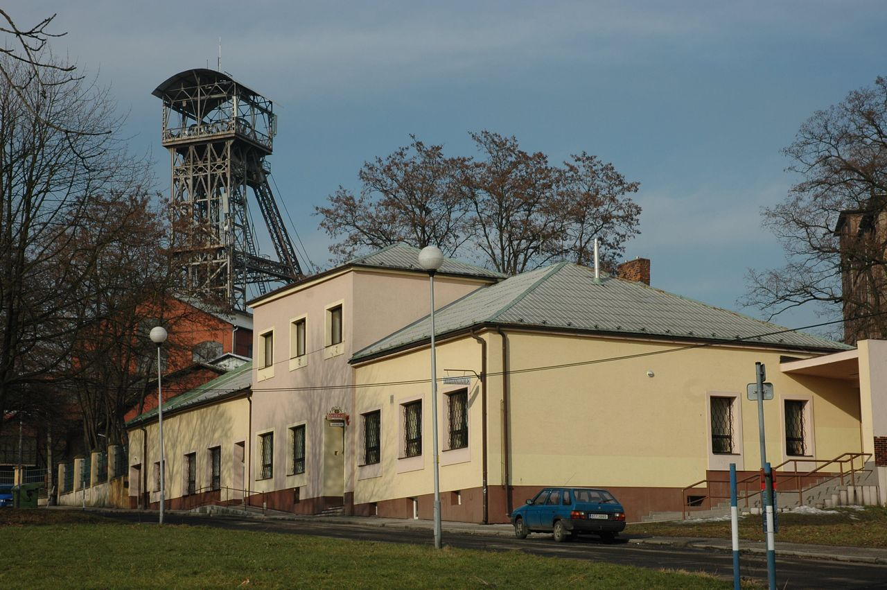 Kulturní dům, Ostrava-Michálkovice